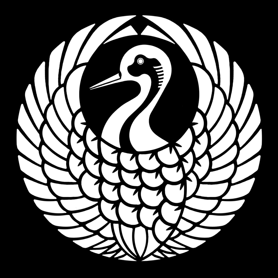 「鶴の丸」紋（染抜）